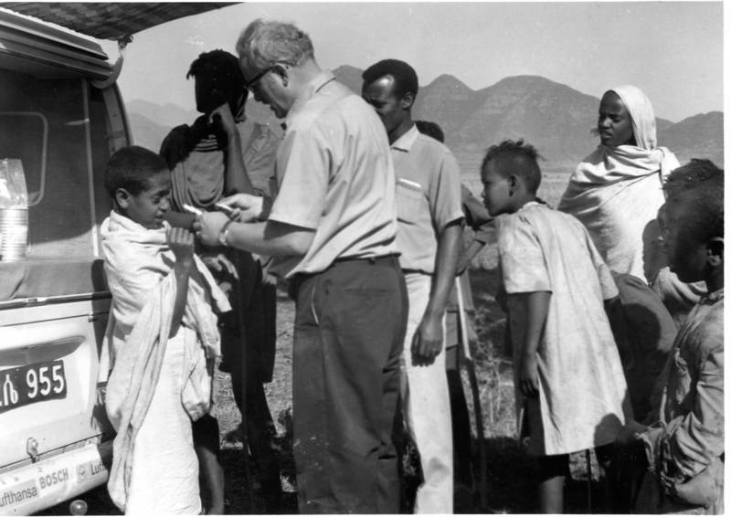 Dietrich Schmoll (DMG) in den 60er-Jahren bei der Arbeit in Äthiopien